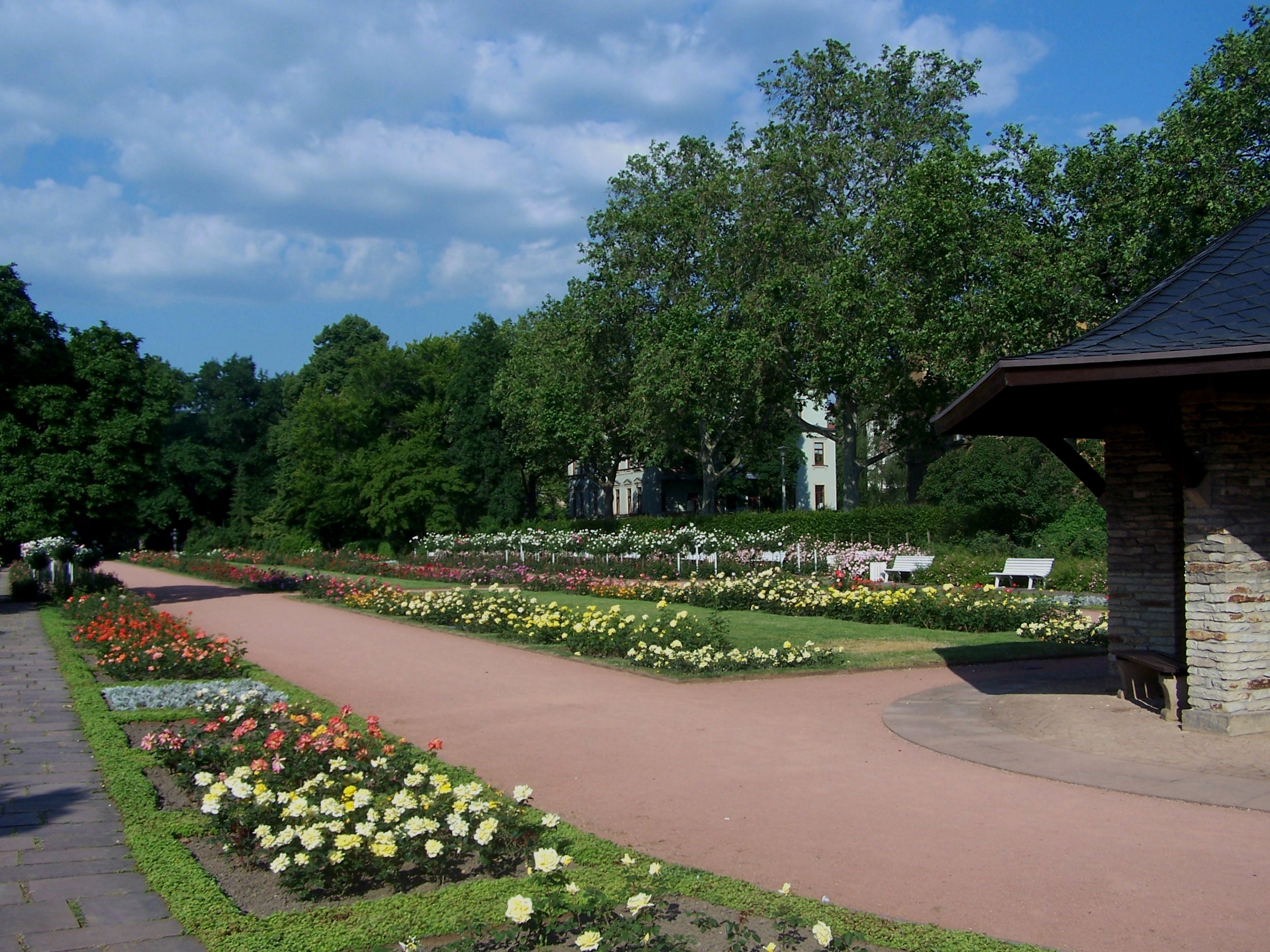 Rosengarten in Dresden (Germany)